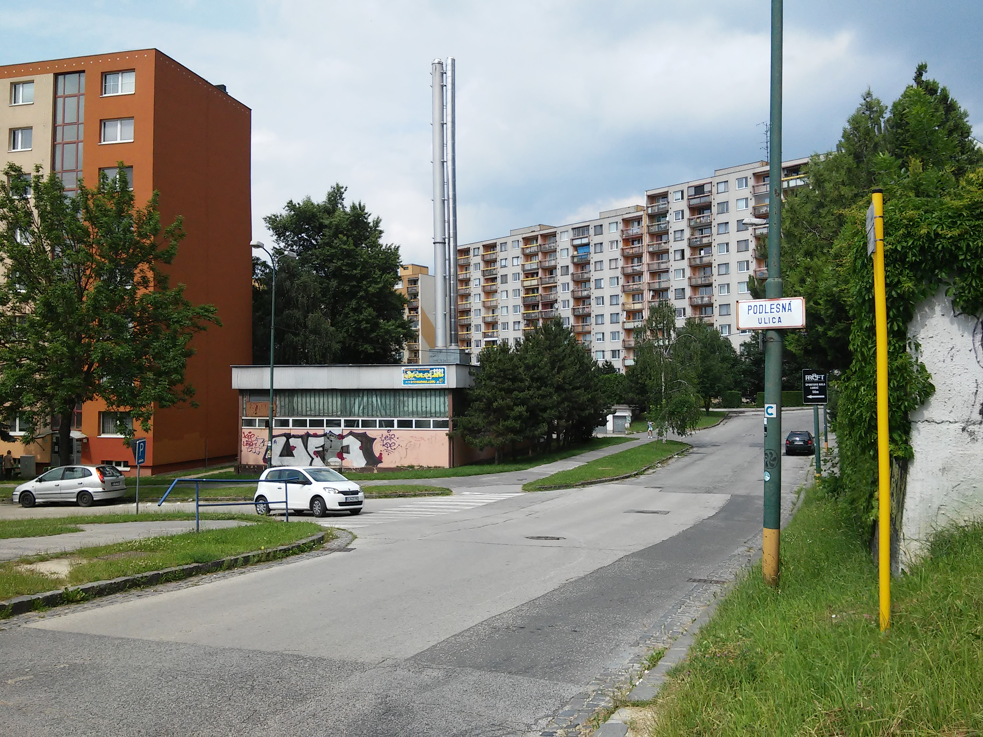 Podlesná, Lamač, Bratislava